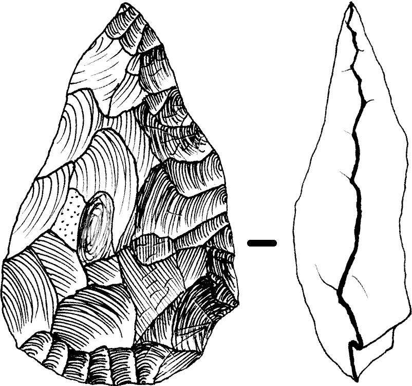 Handaxe from Um-Qatafa